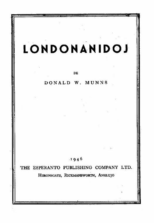 titolpaĝo de la libro